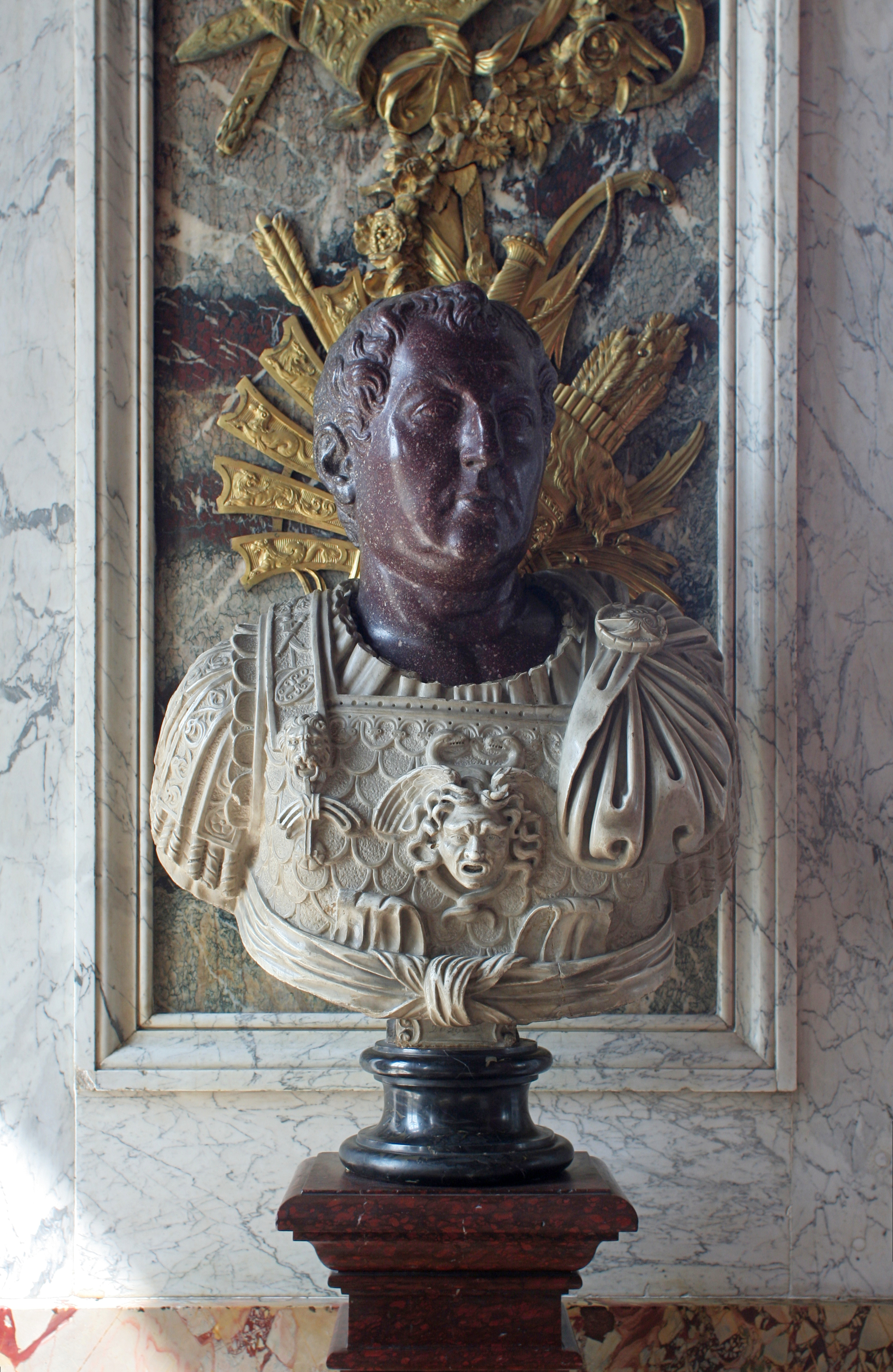 Château de Versailles, salon de la paix, buste de l'empereur romain Othon. Tête en porphyre, vêtements en marbre gris.